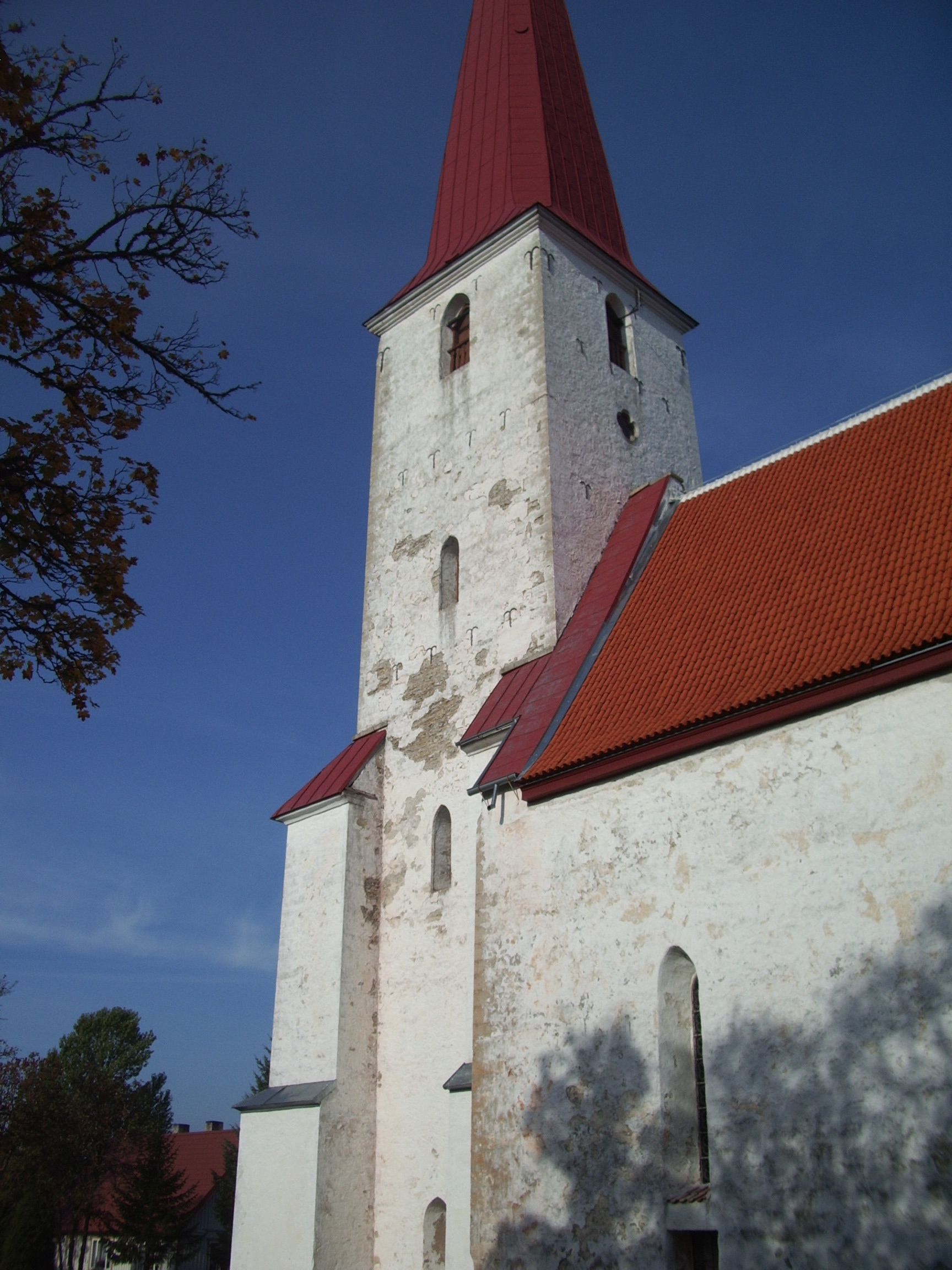 Kihelkonna Mihkli kirik